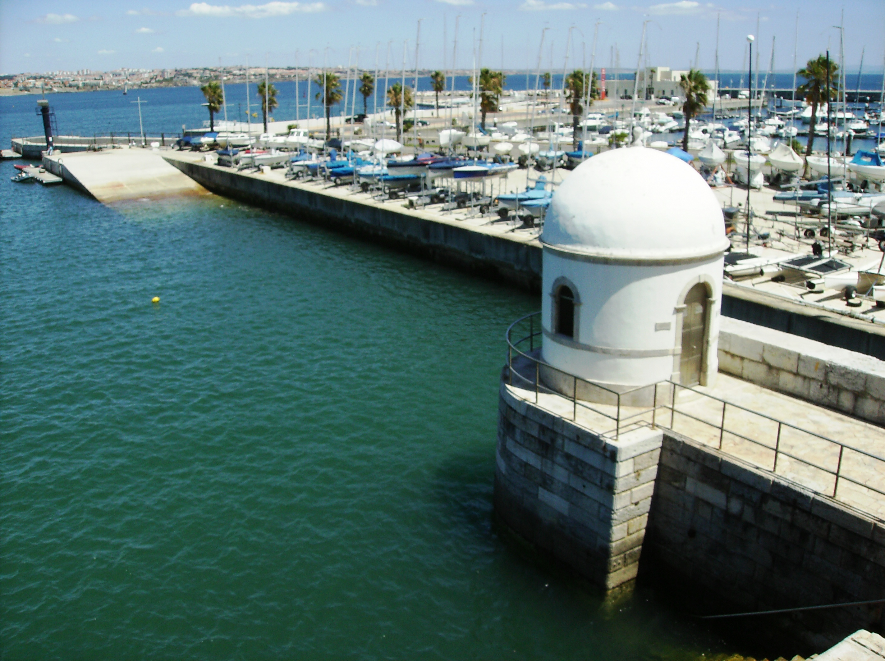 Marégrafo de Cascais, Cascais, Portugal.